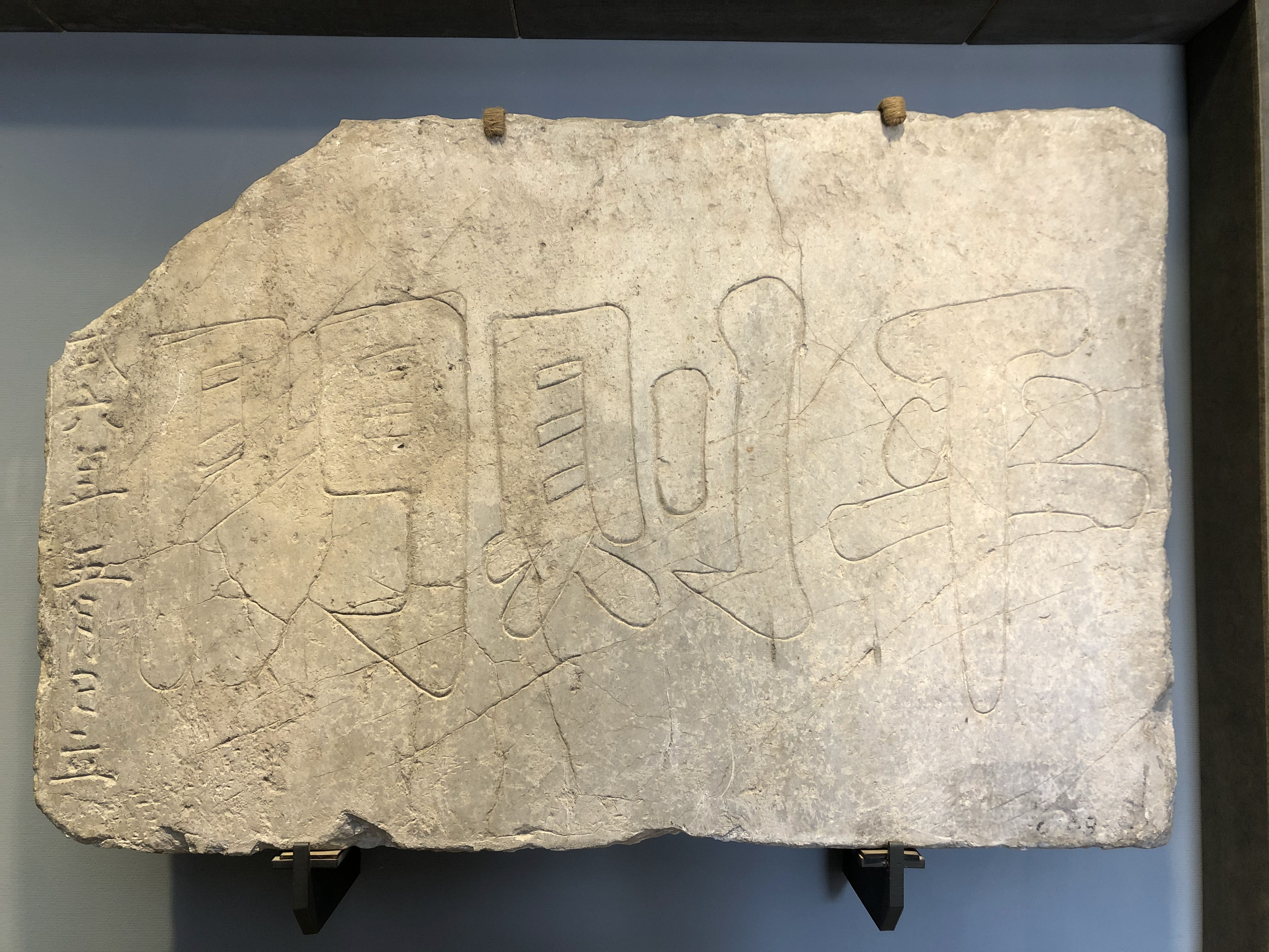 中文（台灣）: 平則門門額